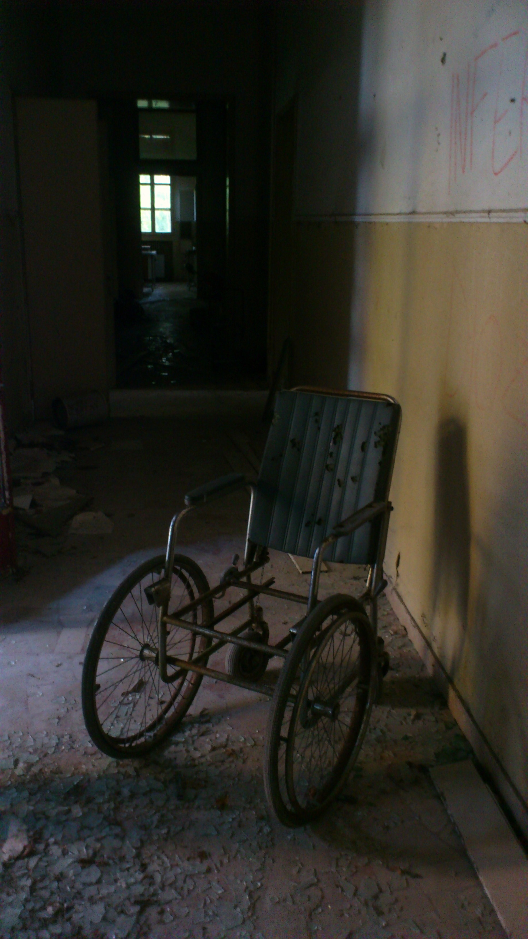 Corridoio del padiglione centrale con sedia a rotelle dell'epoca.